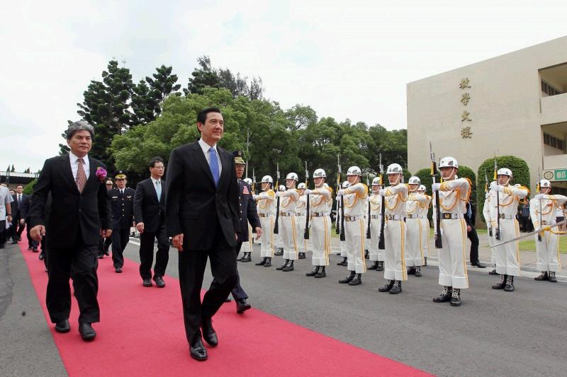 中華民國總統馬英九與內政部部長李鴻源出席「中央警察大學101年度畢業典禮」，校閱中央警察大學儀隊。